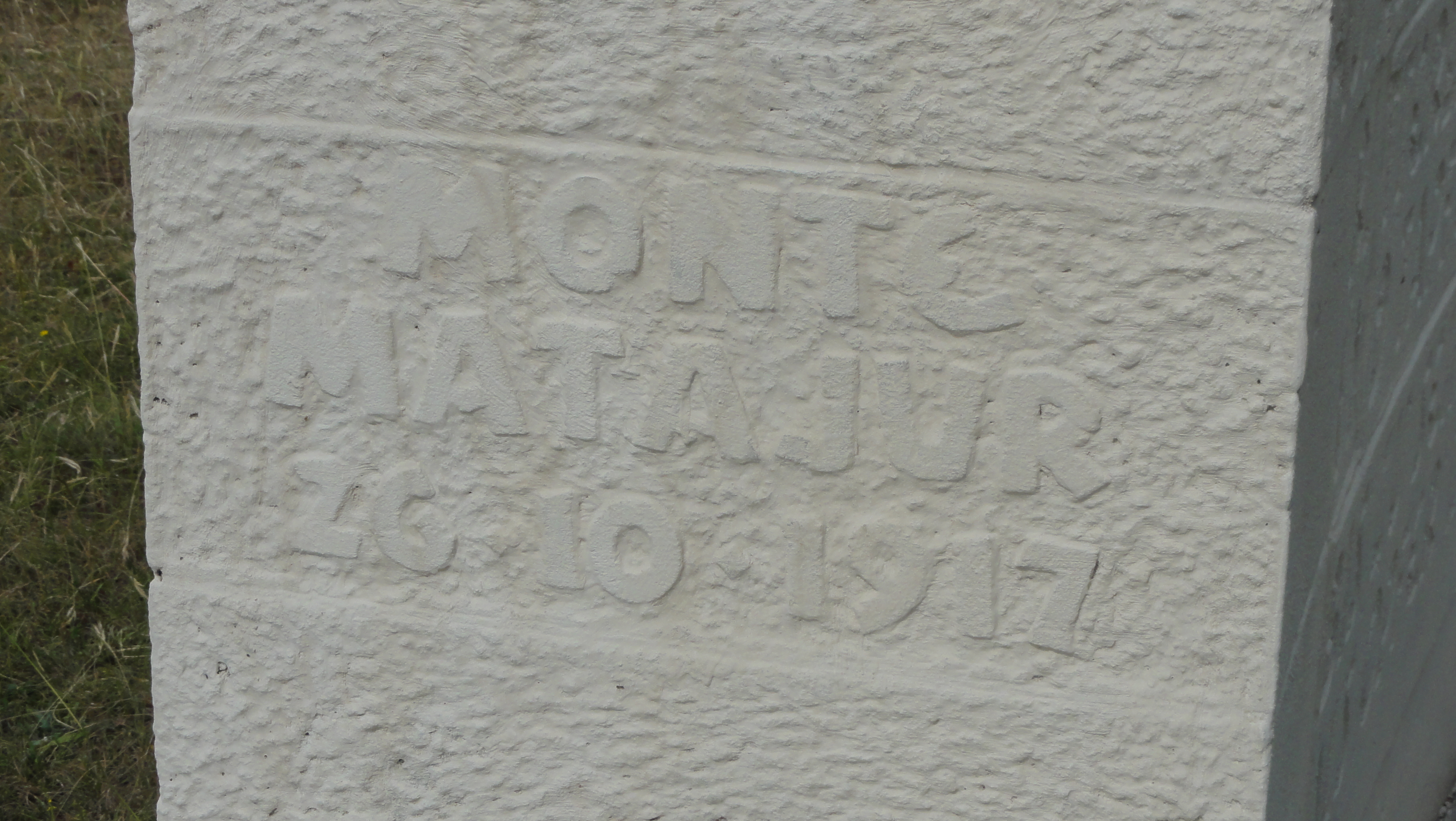 Die seitliche Inschrift am Rommel-Denkmal